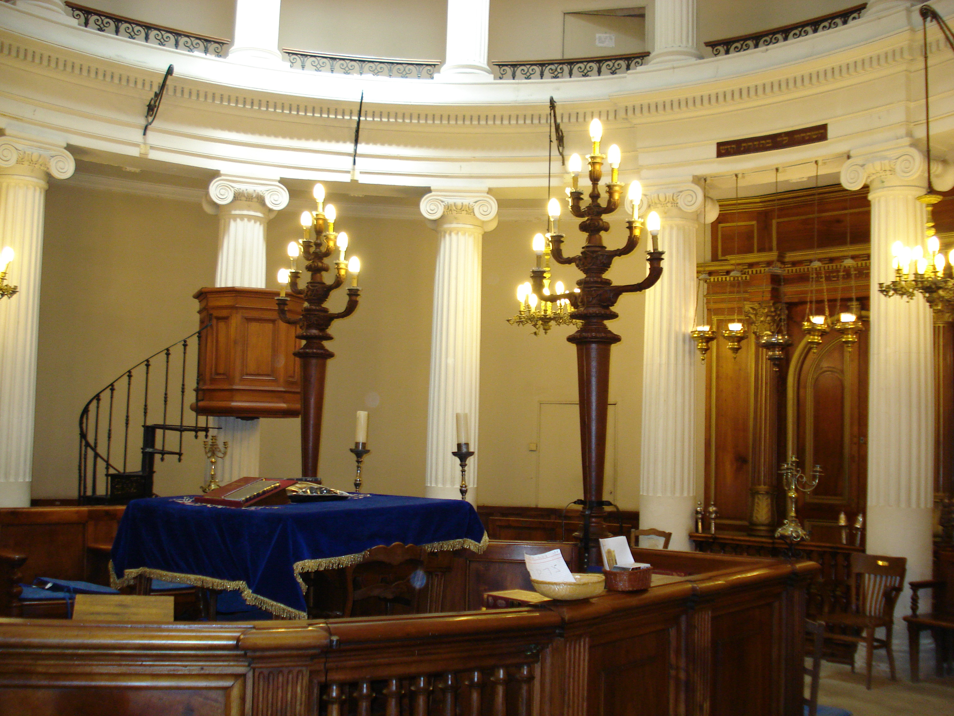 Salle de priere, Synagogue d'Avignon, Vaucluse, France